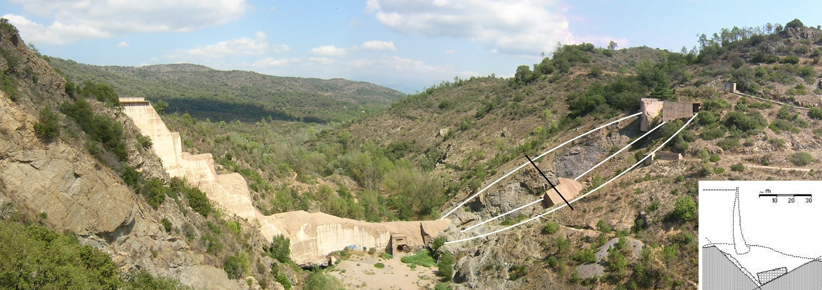 Ruines du Barrage de Malpasset avec la coupe à droite du "dièdre" suite à l'arrachement de la roche.